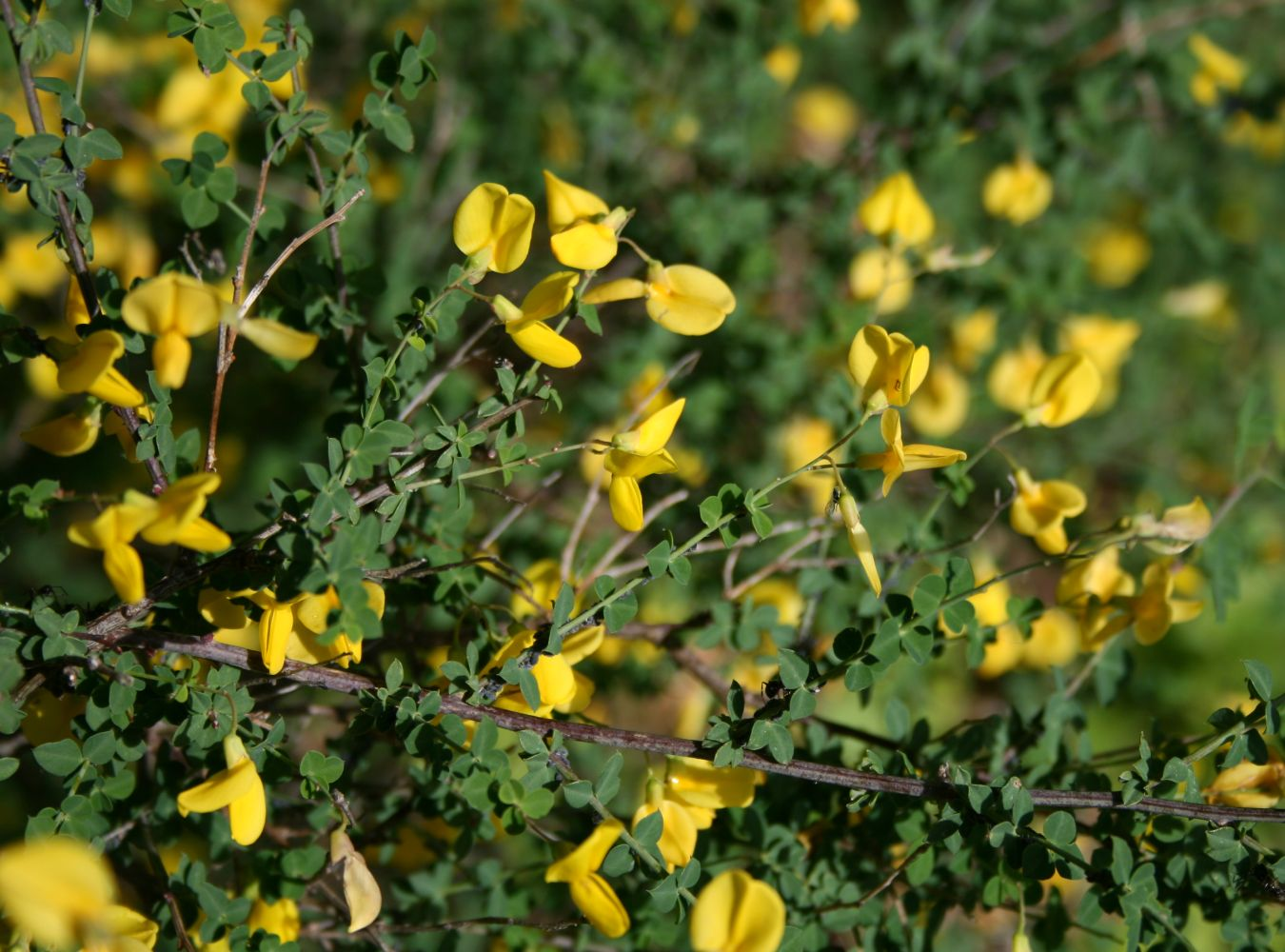 Cytisophyllum sessilifolium, Hülsenfrüchtler (Fabaceae), Schmetterlingsblütler (Faboideae) - Italien/Italia/Italy: Basilicata, Prov. Potenza, Parco Nazionale del Pollino, San Lorenzo SE Rotonda